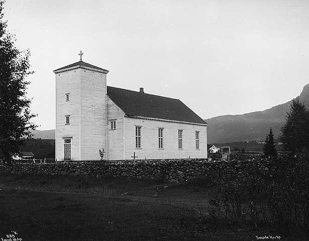 Sauda kirke i 1913.